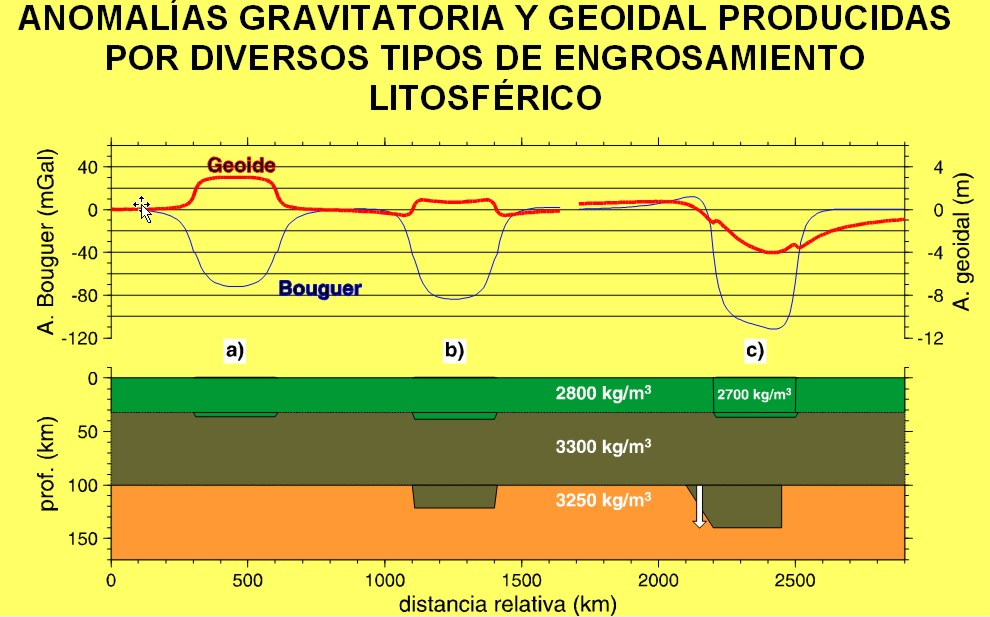 Anomalías geoidal y gravimétrica producidas por distintos cambios de grosor de la corteza terrestre (verde) y del manto litosférico (marrón) respecto a una geometría de referencia. Creado usando el software tAo (programado por Daniel Garcia-Castellanos y coautores, 2002, Tectonics).